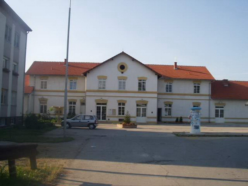 Borovo Naselje - Train Station